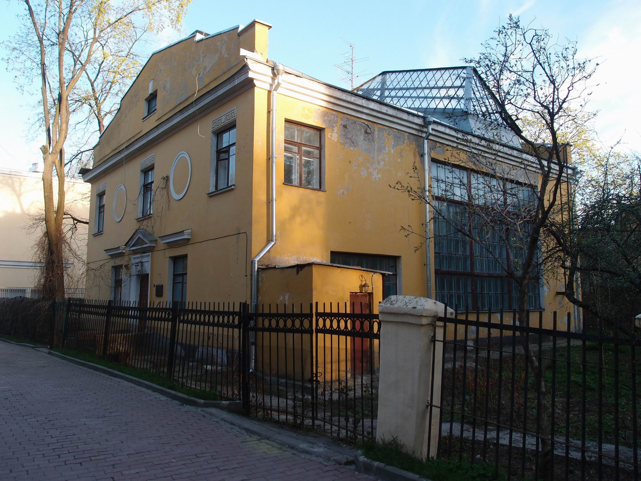 Мастерская скульптора Веры Игнатьевны Мухиной в 1947-53 годах, Пречистенский переулок, 5а